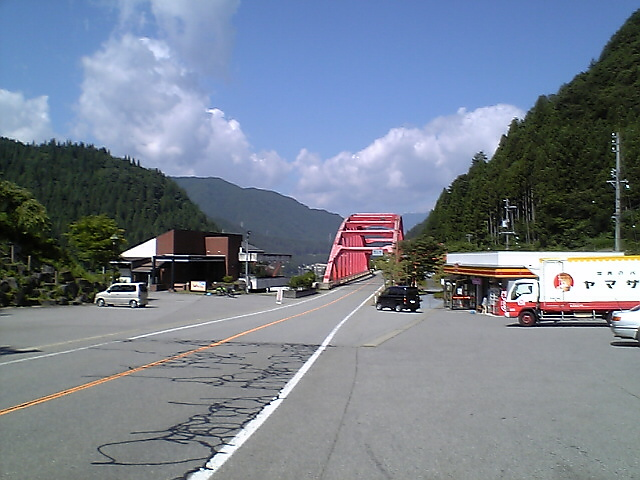 国道471号